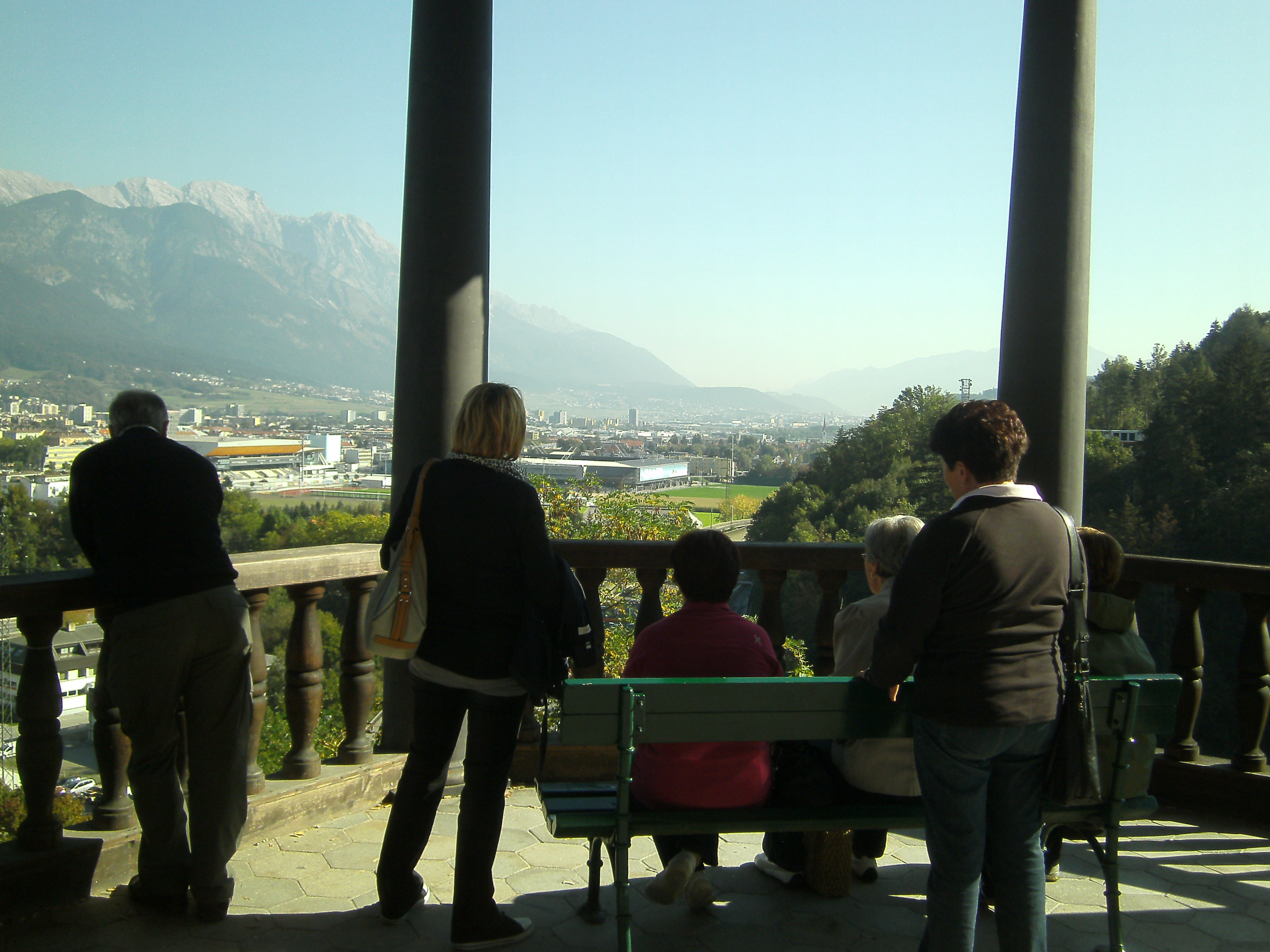 Beim Tiroler-Kaiserjäger-Museum